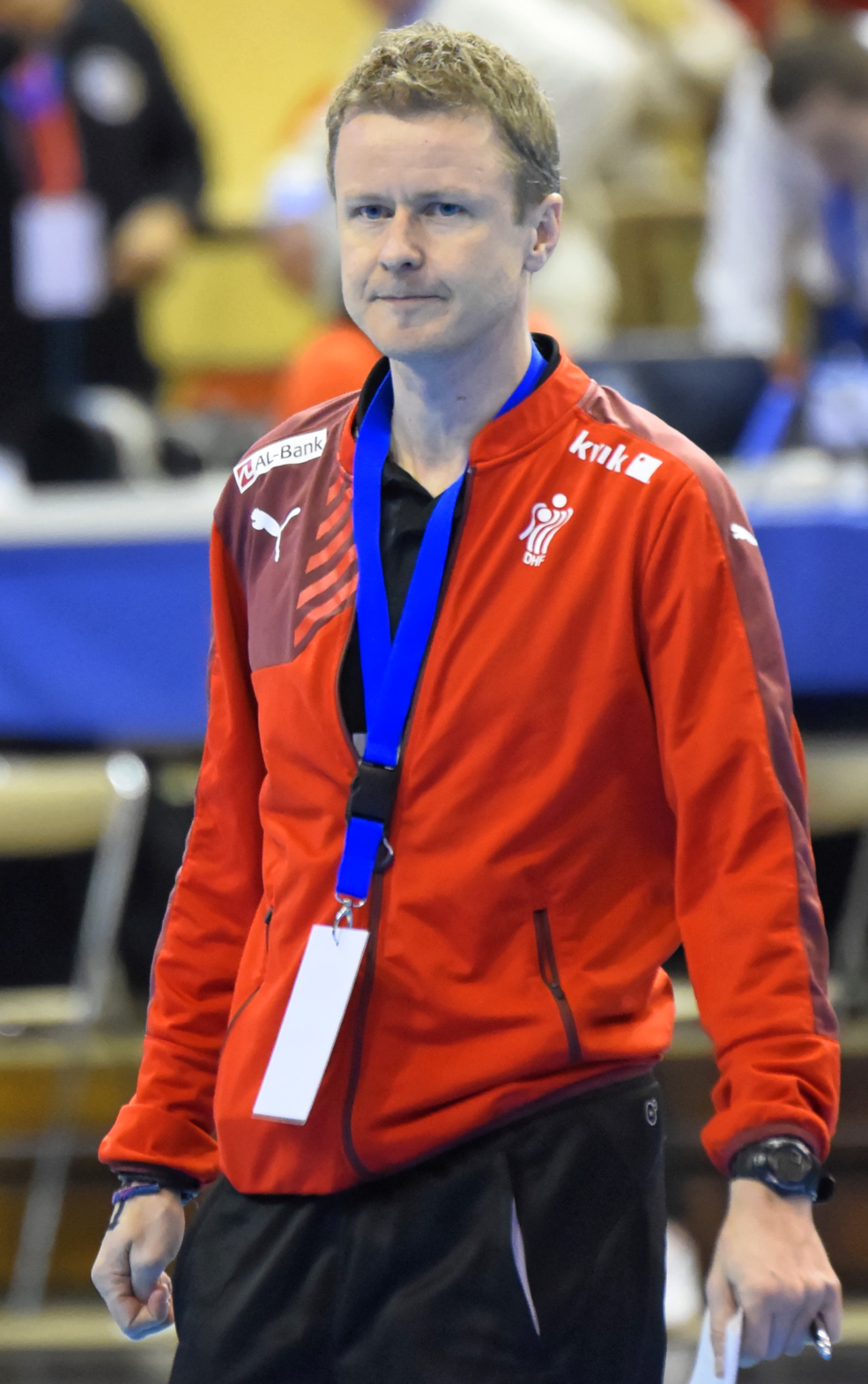 Rencontre France - Danemark lors de la Golden League. A Dijon, le 19 mars 2015.